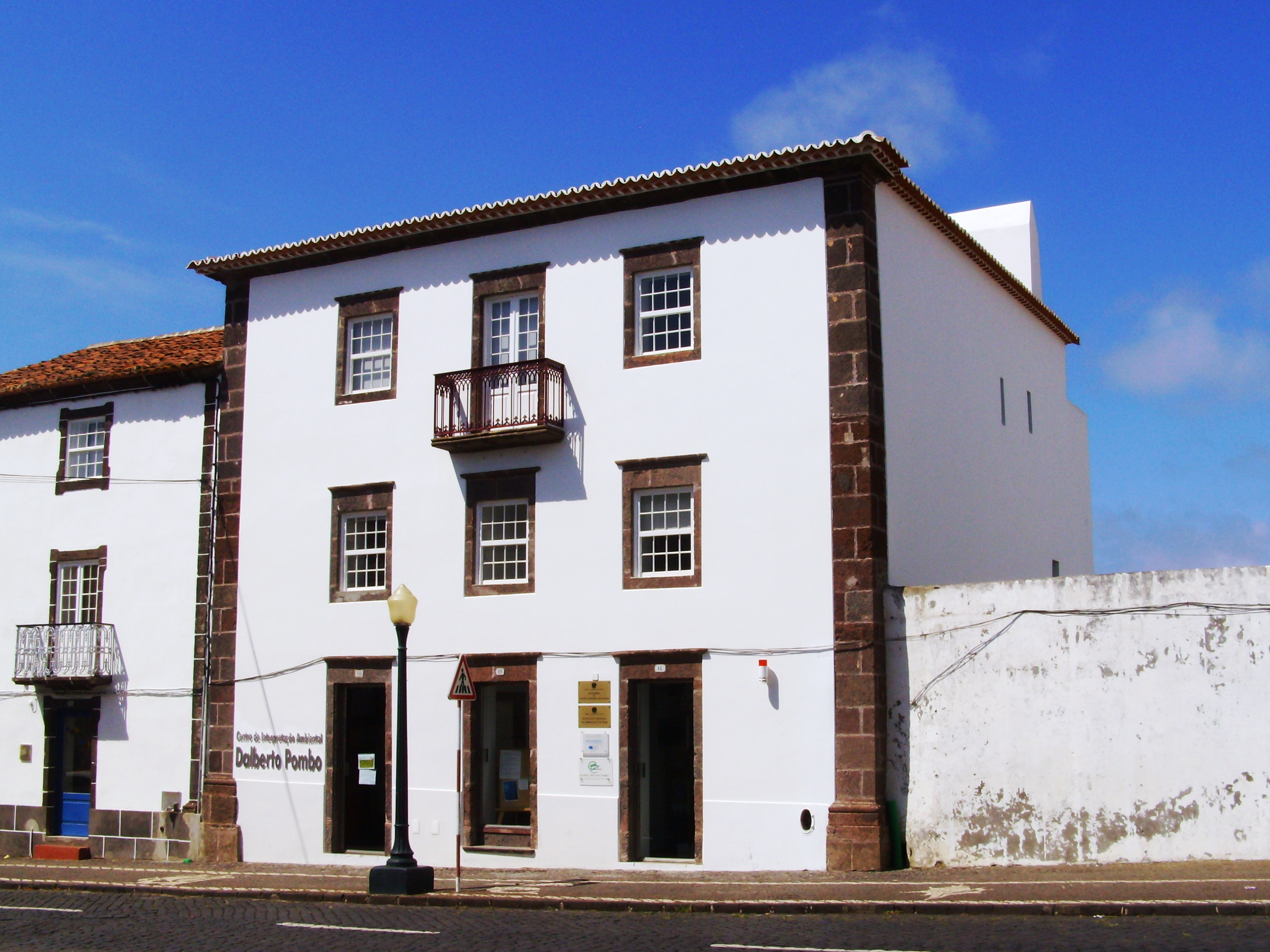 Centro de Interpretação Ambiental Dalberto Pombo, freguesia e concelho de Vila do Porto, ilha de Santa Maria, Açores.